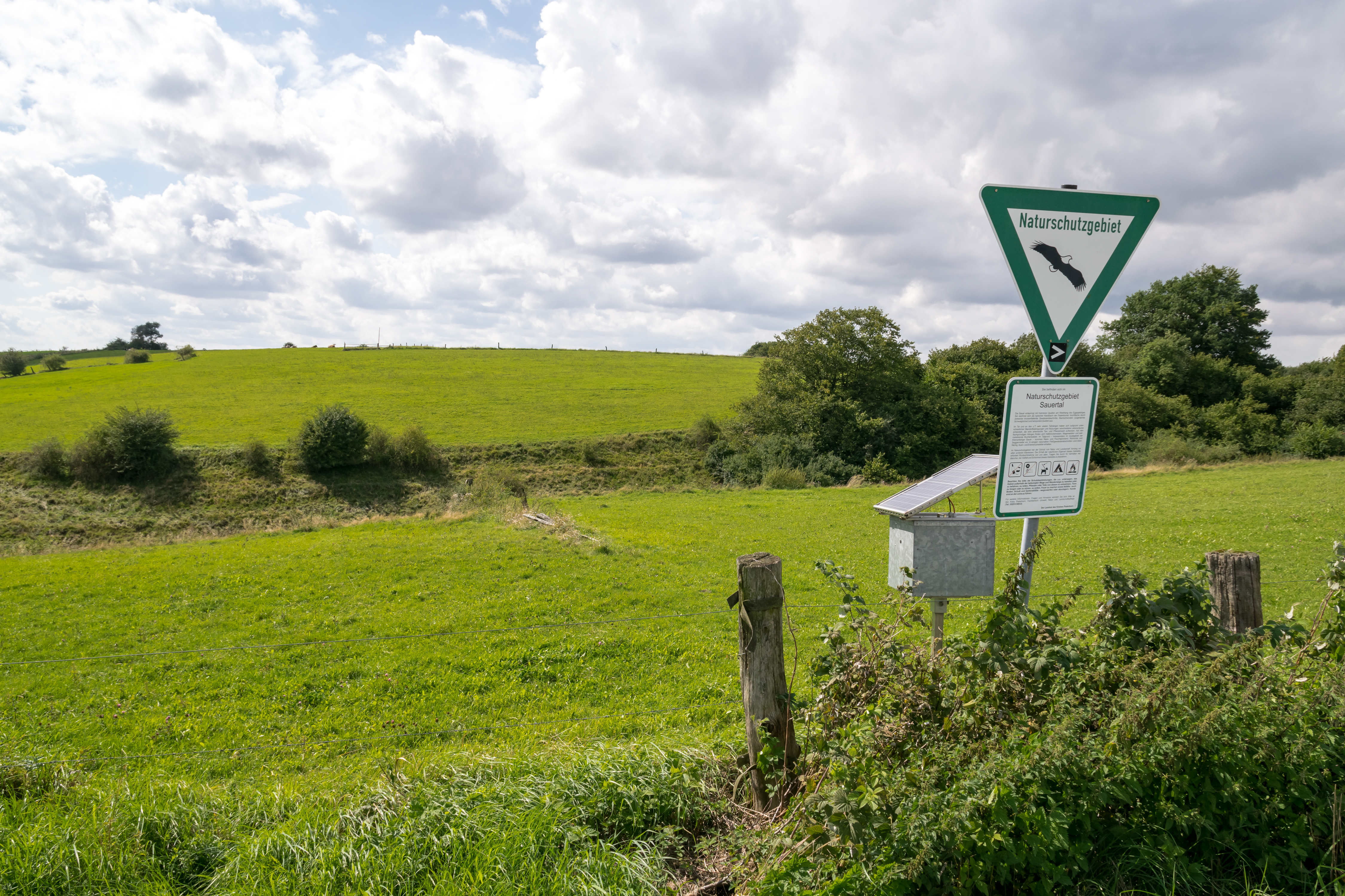 Naturschutzgebiet Sauertal, hier Abschnitt in Lichtenau-Kleinenberg, Kreis Paderborn